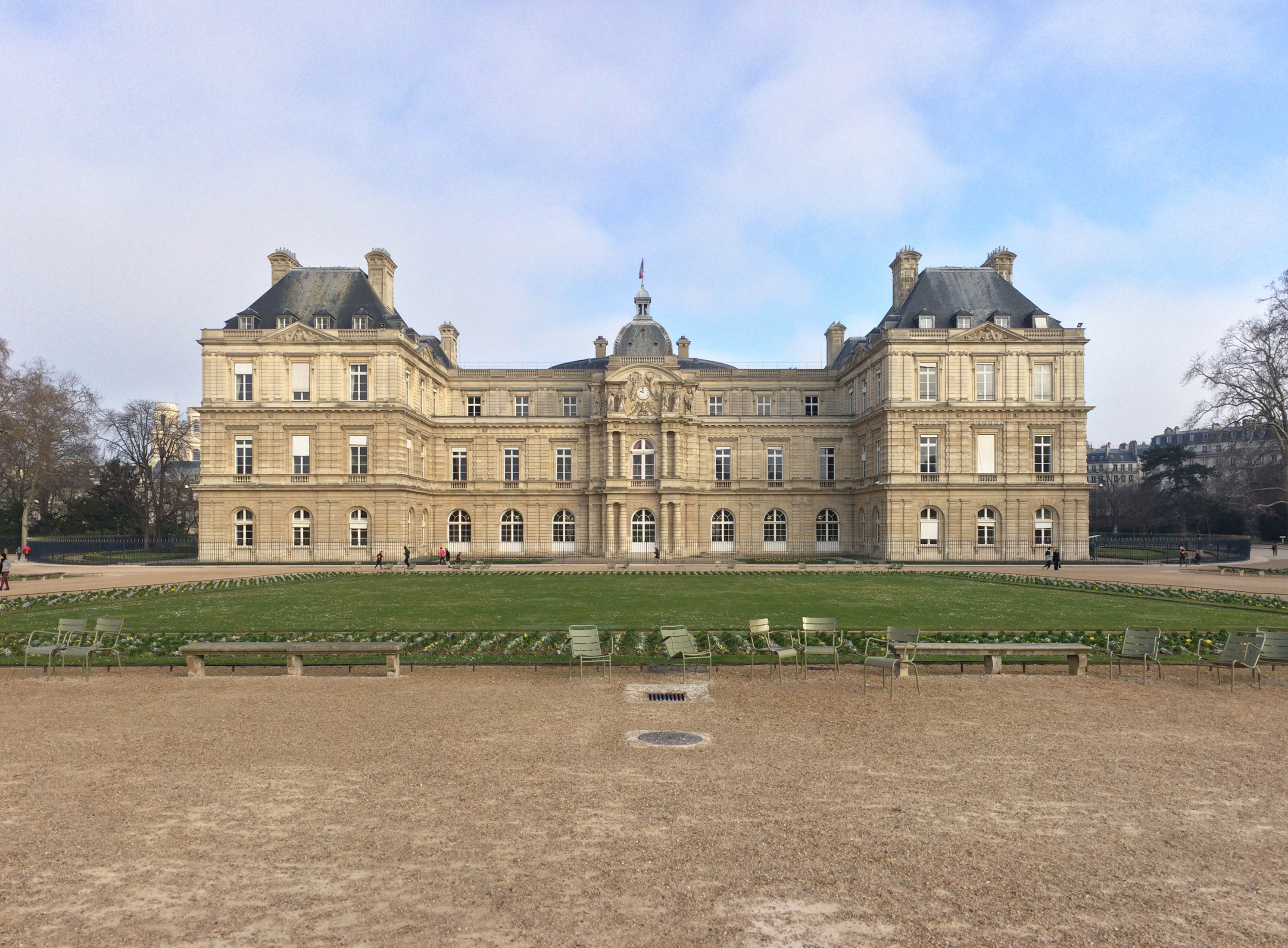 Palais du Luxembourg, Sitz des französischen Senats, Rue de Vaugirard, Jardin du Luxembourg, 6e arrondissement, Paris, 1615–1645, Salomon de Brosse, 1799–1805, Jean Chalgrin, 1835–1856 Alphonse de Gisors